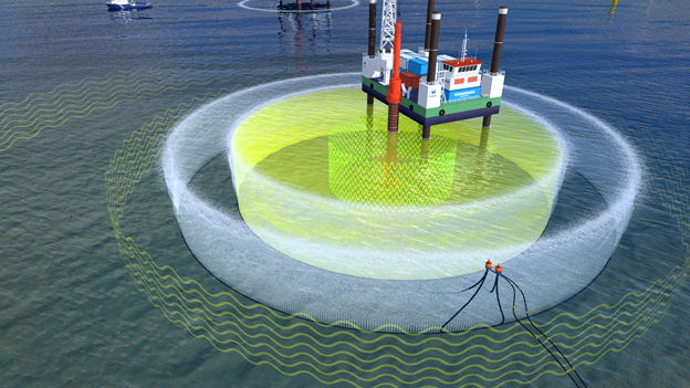 Grafische Darstellung der Schalldämpfung. 3D-Illustration